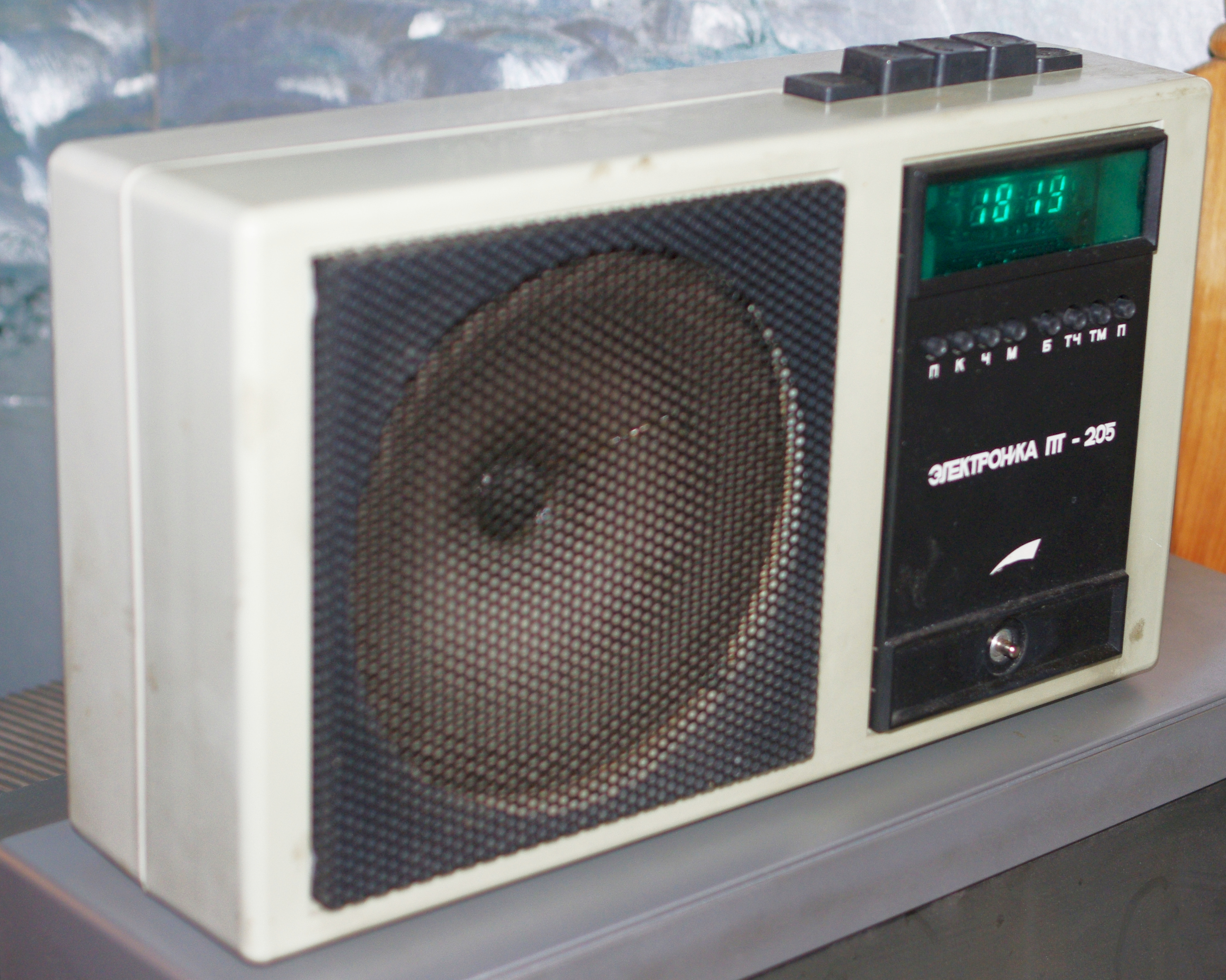 Russian cable radio Elektronika PT-205 Электроника ПТ-205